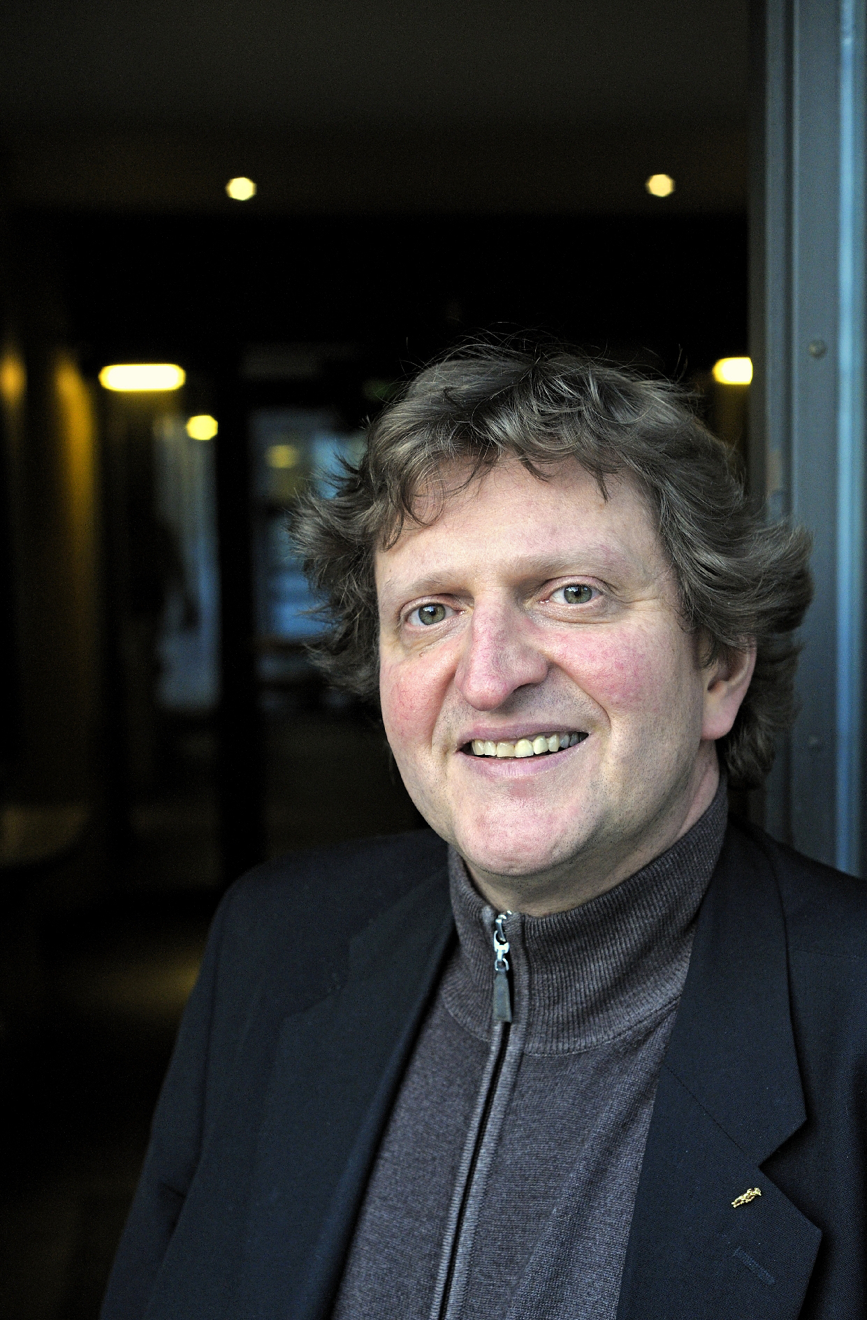 Anton G. Leitner